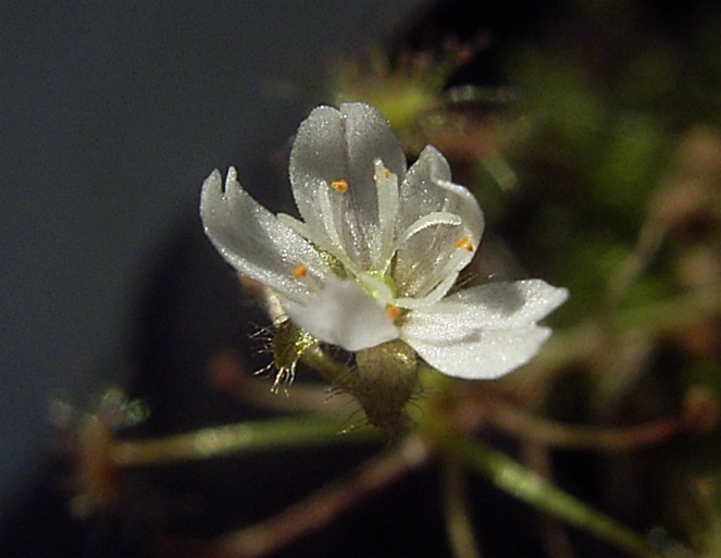 Drosera banksii flora